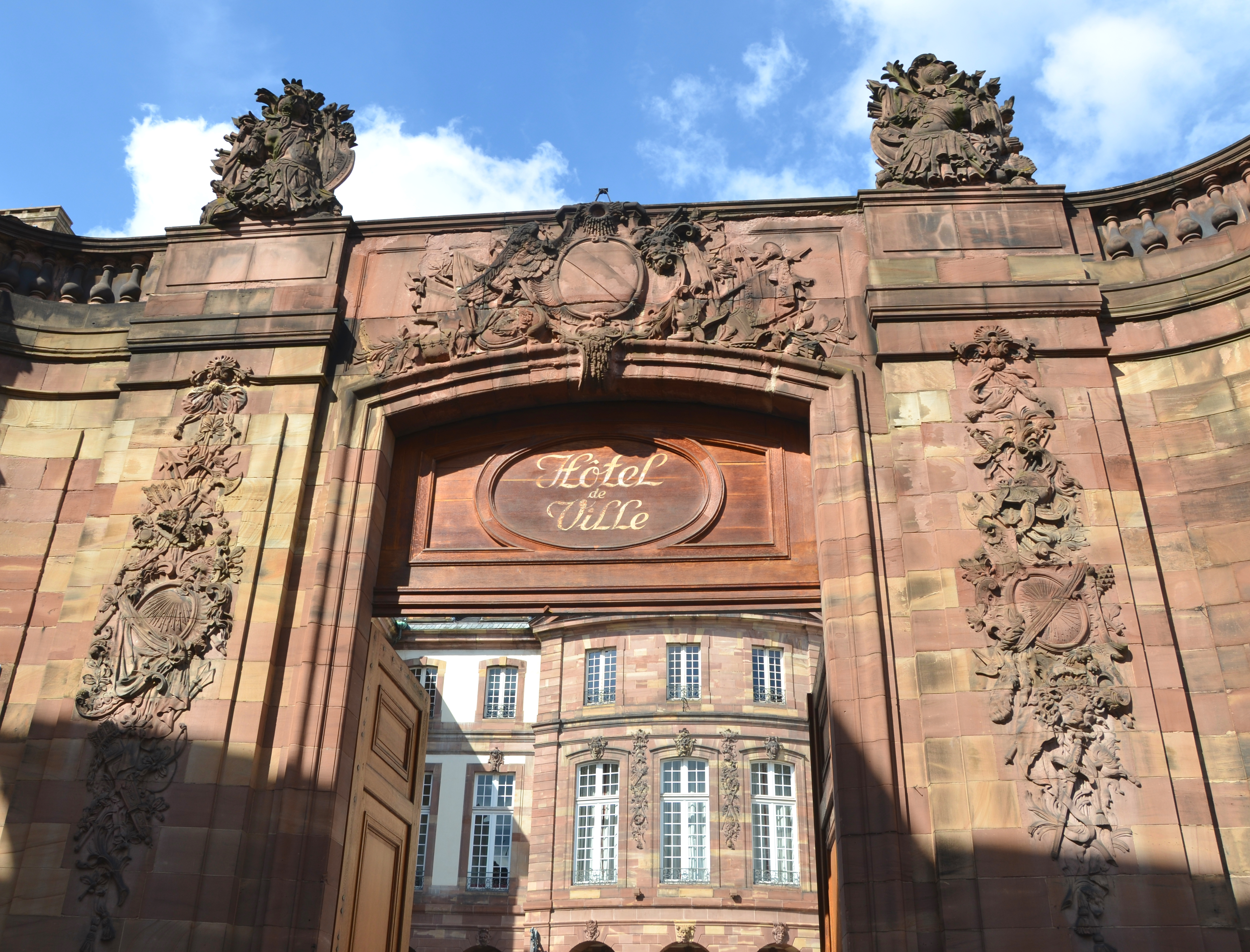 Hôtel particulier du XVIIIe siècle pour le comte Johann Reinhard III de Hanau-Lichtenberg, puis repris par la ville ensuite à la révolution et aménagé en hôtel de ville.